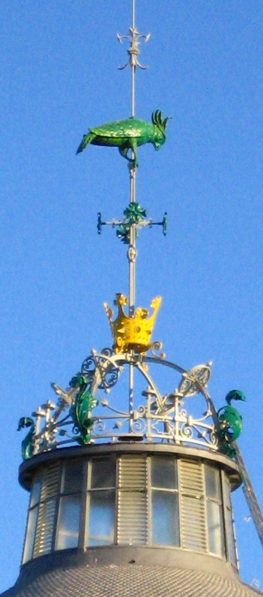 Cotorra del Mercat (València)